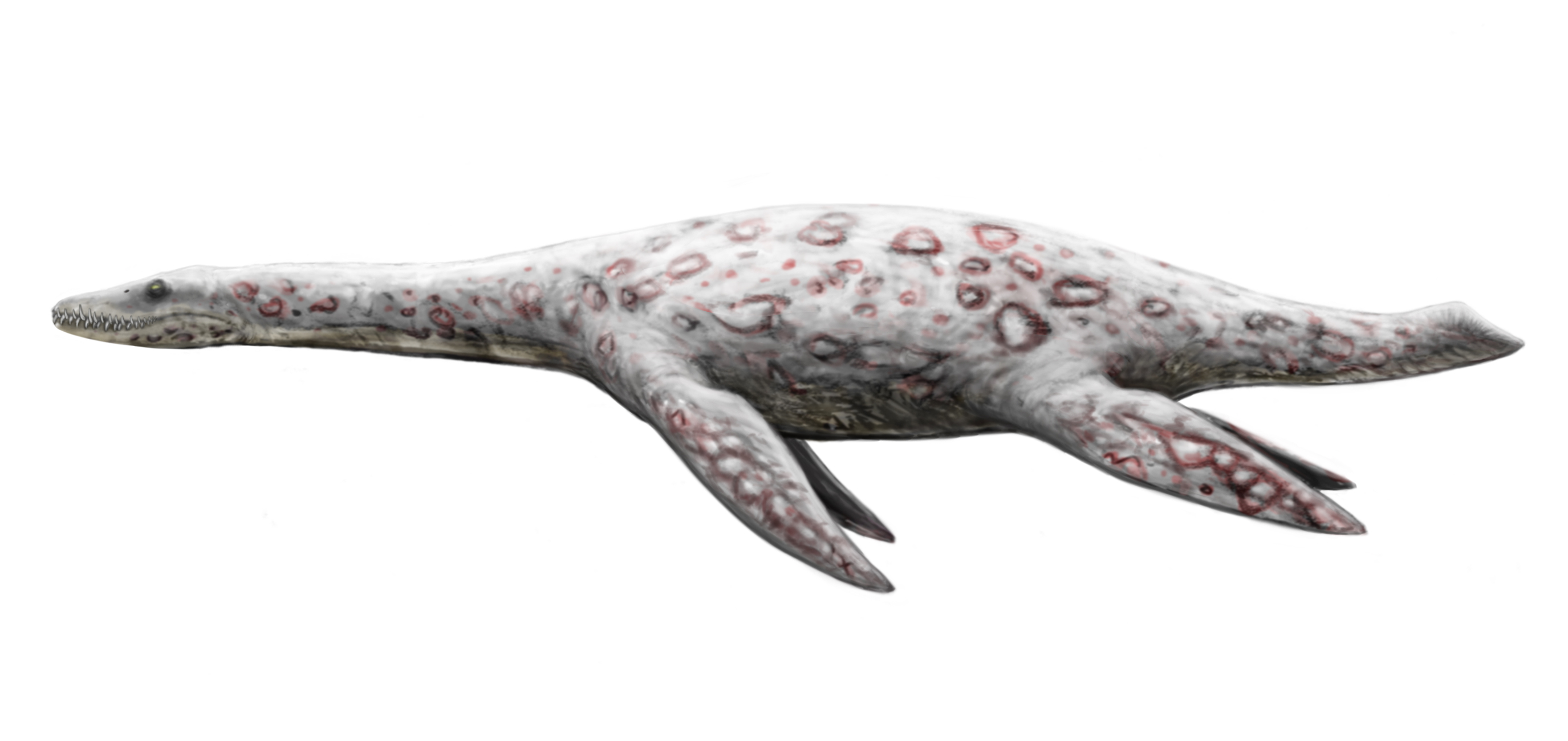 Bishanopliosaurus youngii.